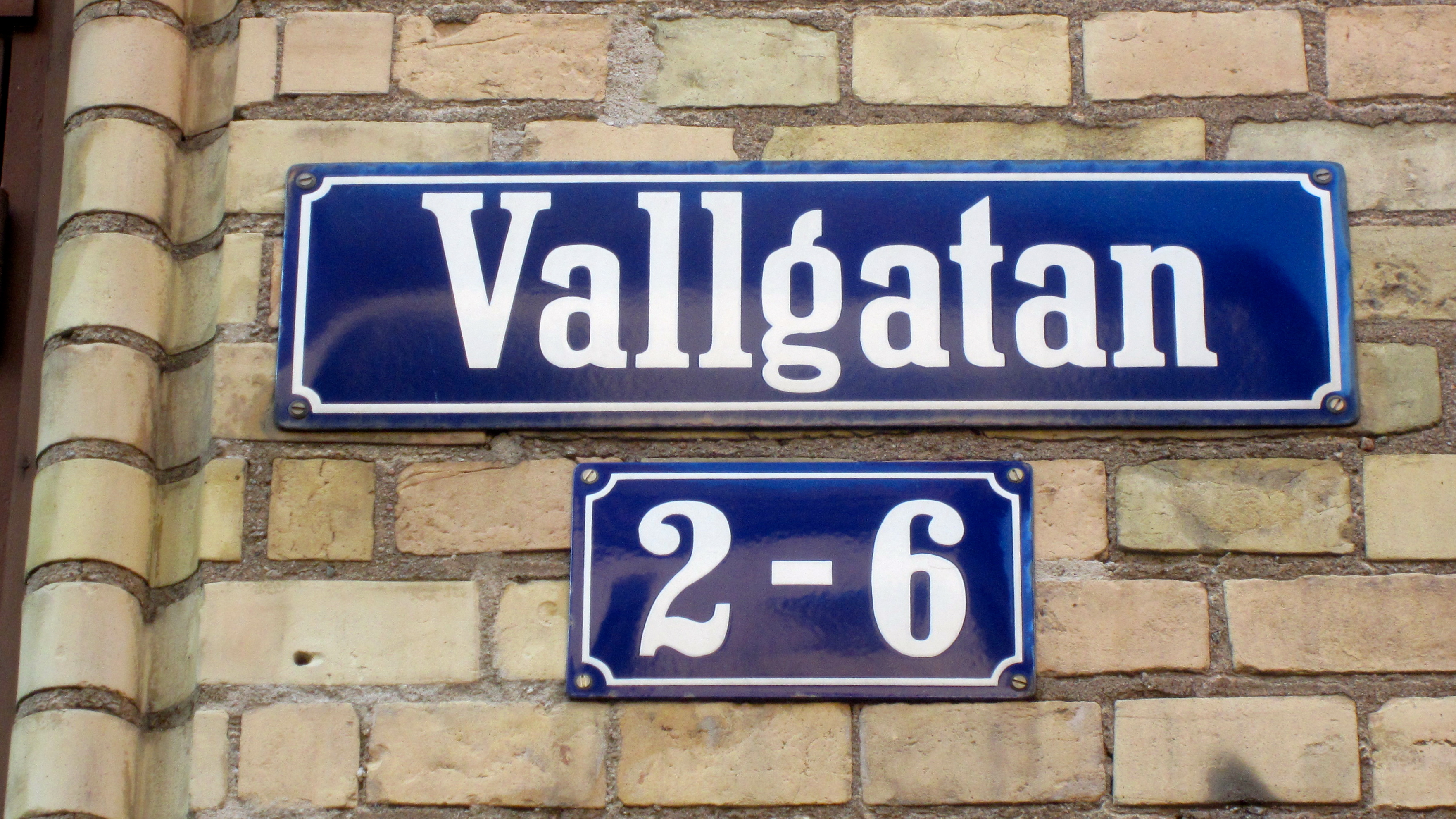 Vallgatan 2-6, gatuskylt i Göteborgs centrum.